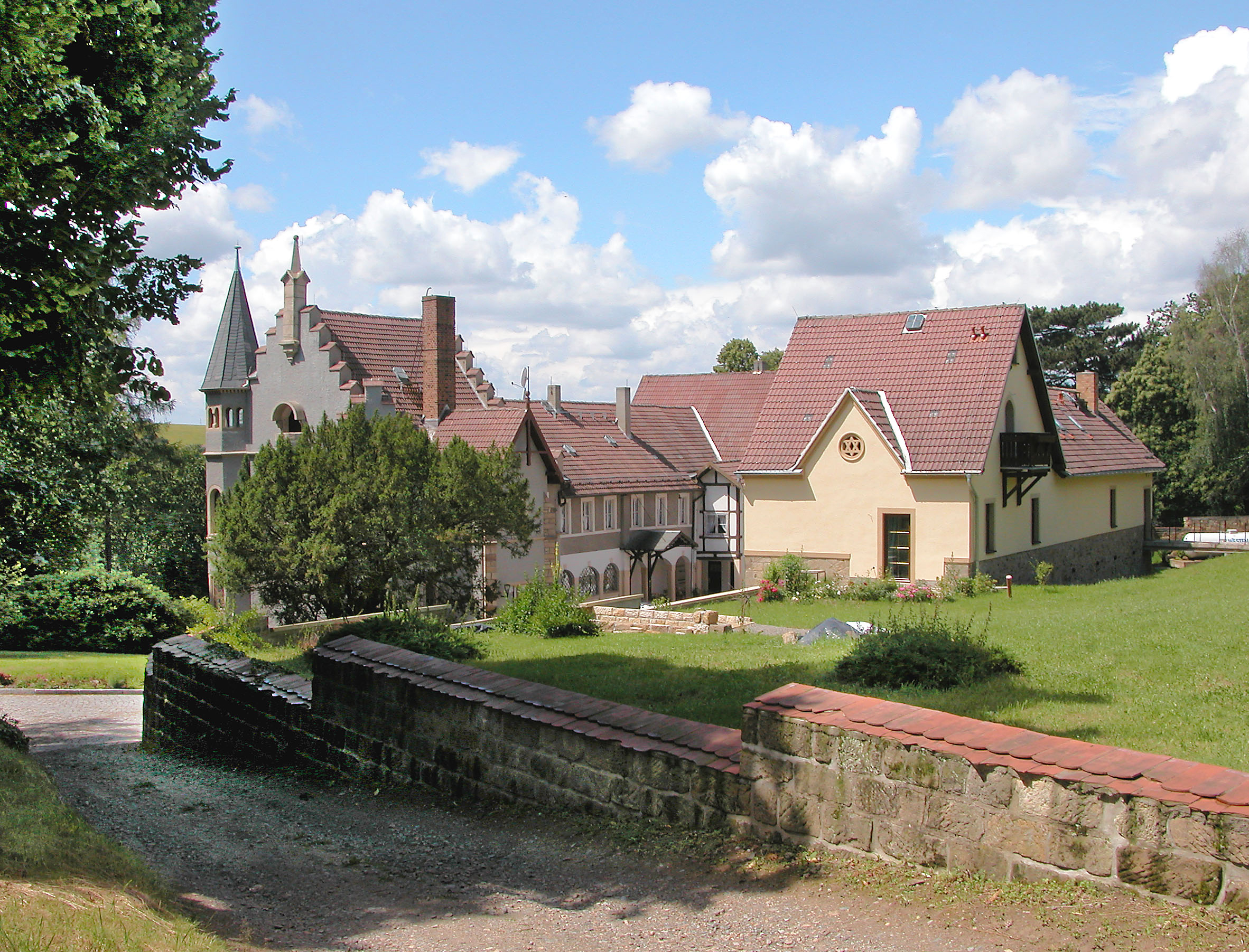 11.07.2004 01723 Herzogswalde, Hauptstraße 13 (GMP: 51.013512,13.490040): Jagdschloß. Das Anwesen wurde 1856 durch Erich von Schönberg auf Oberreinsberg erworben. Die vorgefundenen Gebäude des Hamannhofes blieben erhalten, wurden aber um ein schloßartiges Wohngebäude ergänzt. In der DDR-Zeit wurde das Jagdschloß in Herzogswalde als Altersheim und Lehrlingswohnheim genutzt und nach 1990 von der Agrargenossenschaft Herzogswalde in eine Pension umgebaut. [DSCN4797.TIF]20040711140DR.JPG(c)Blobelt